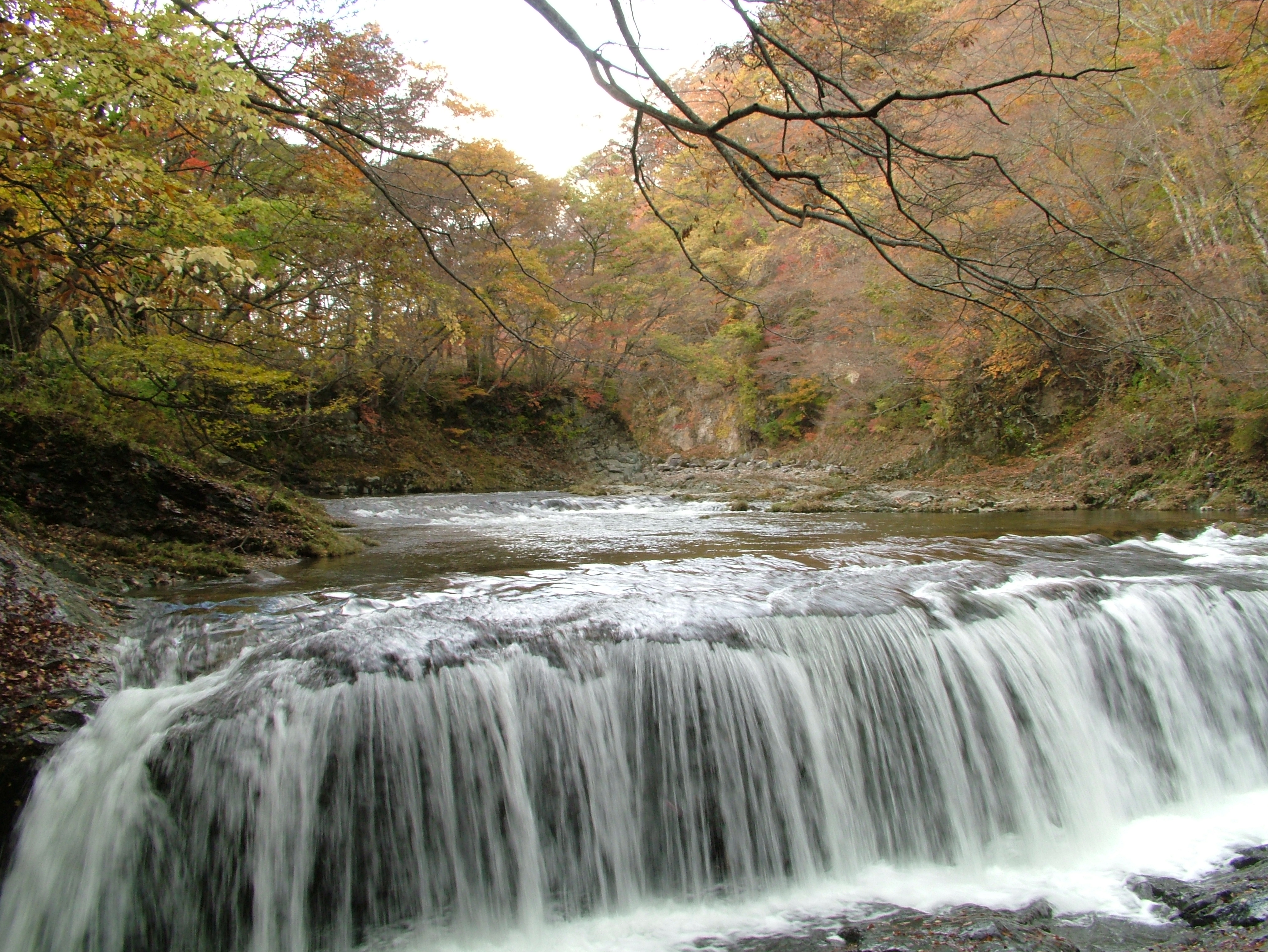 浅布渓谷 紅葉の様子